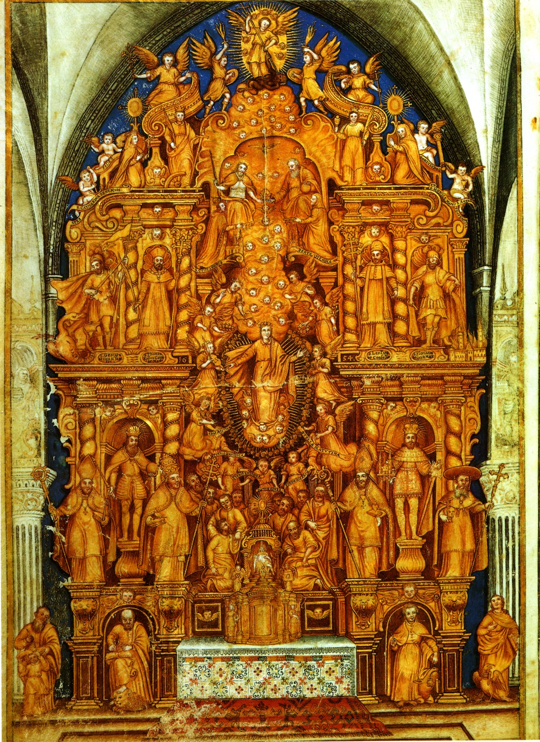 Drawing of Main Altar Cathedral of Gurk/Dom zu Gurk: Zeichnung des Hauptaltars im Verbrüderungsbuch